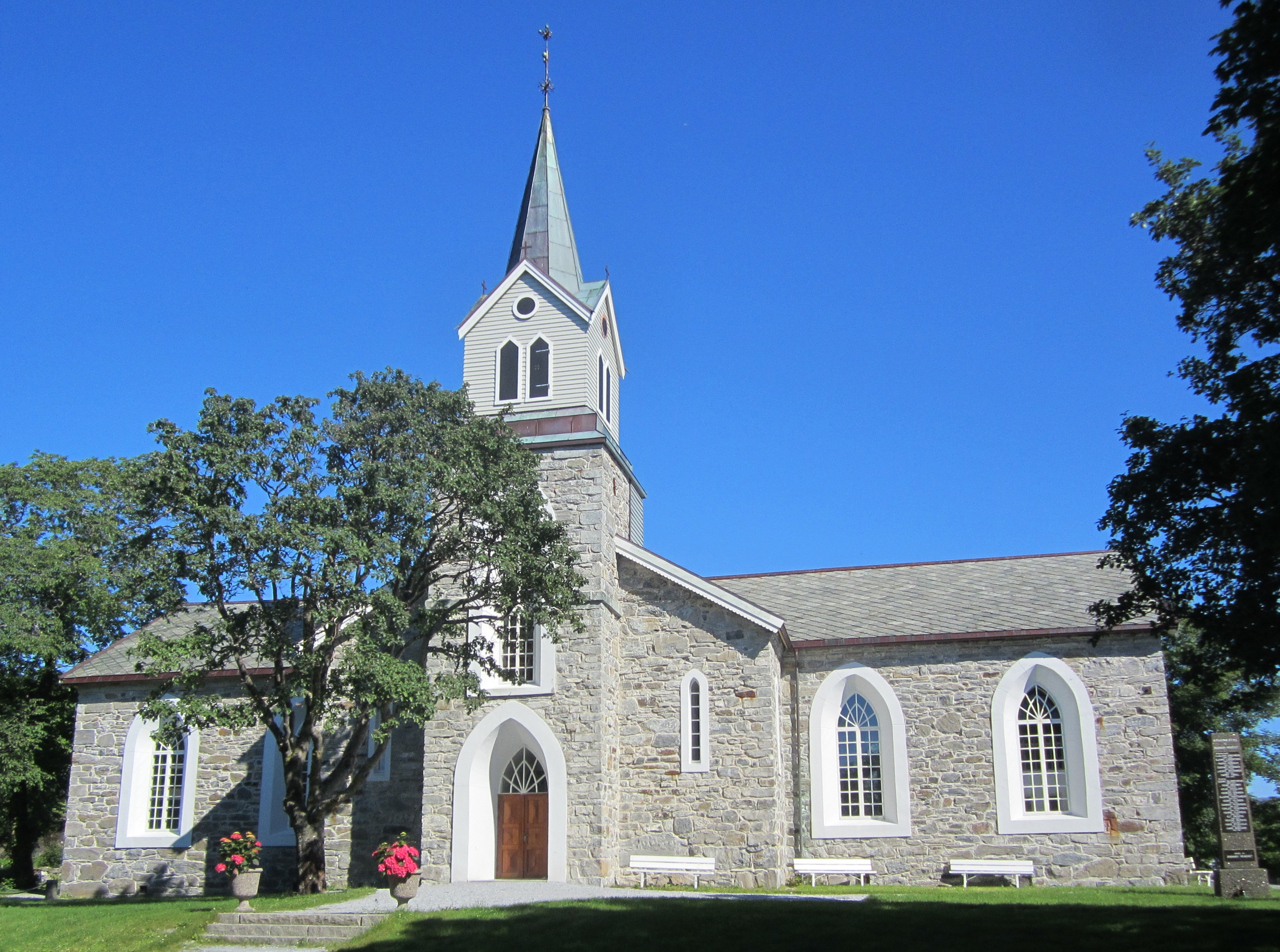 Brønnøy kirke fra vest